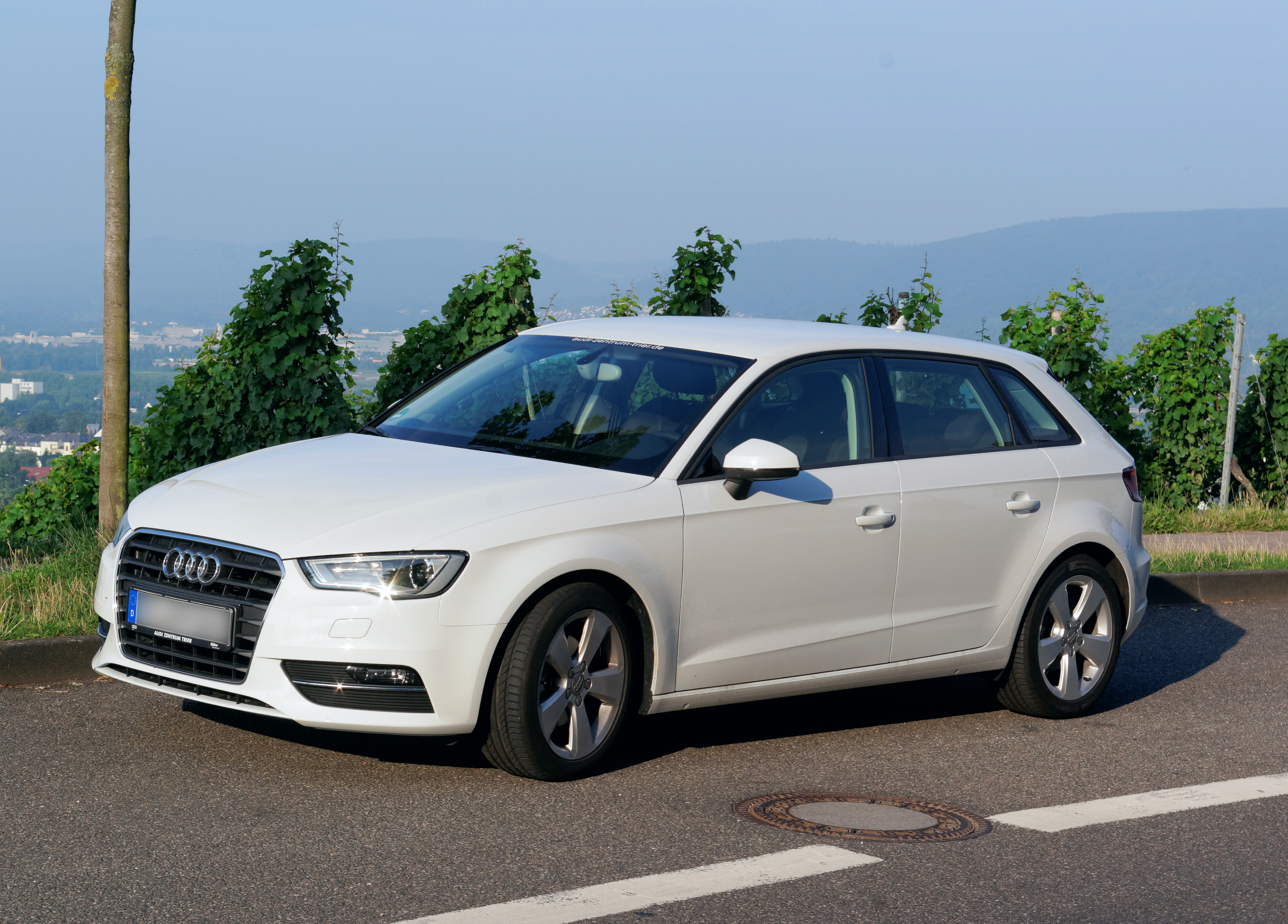 Audi A3 8V, Baujahr 2014, 2 L TDI, 150 PS